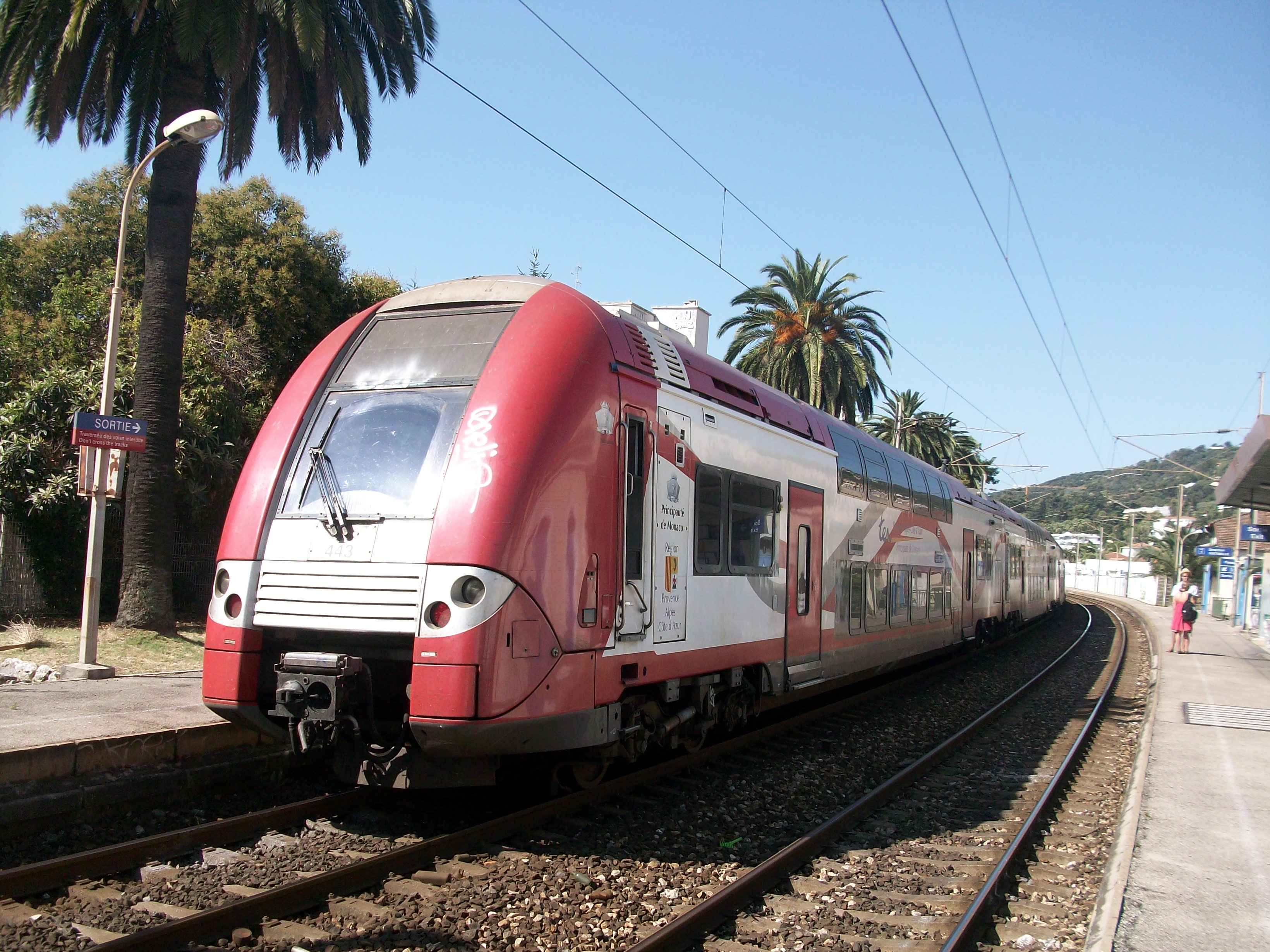 Z 26500 en livrée monégasque sur un TER PACA